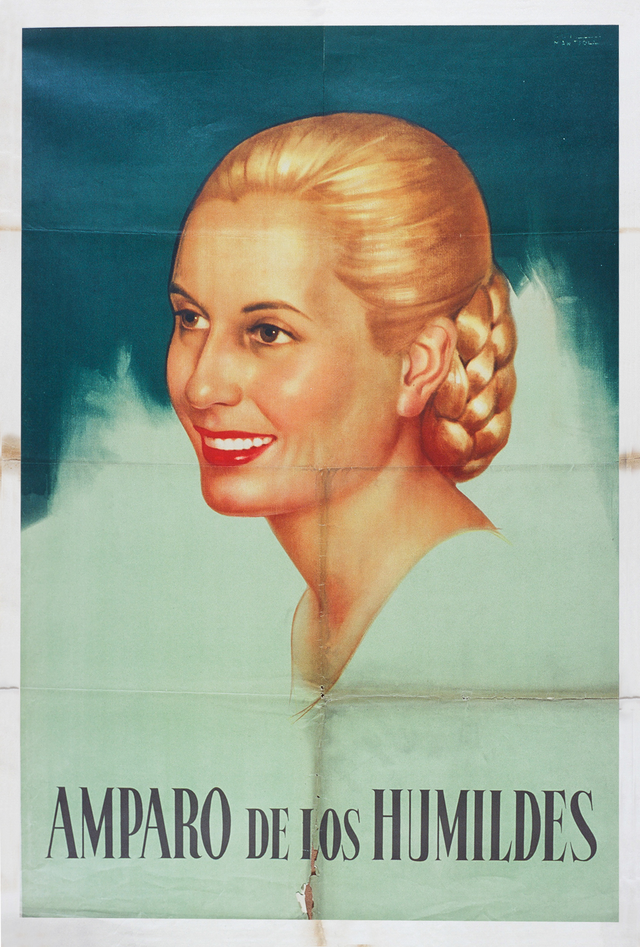 Amparo de los Humildes. Afiche con el retrato de Eva Perón.